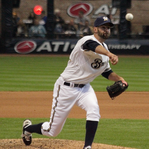 Burke Badenhop